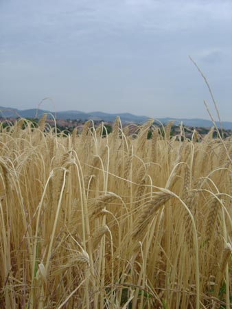 Champs d'orge brassicole (Soucieu-en-Jarrest, Rhône, France) - Barley field